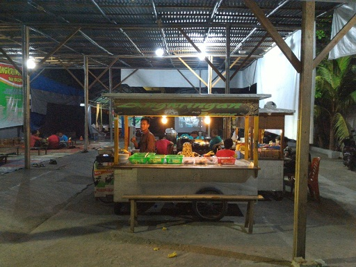 CENTRE PEKANBARU COMMUNITY